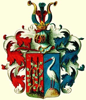 Wappen der Adelsfamilie von Storch Datum: 1753 Urheber: unbekannter Heraldiker Quelle: Zieladresse des Bildes: This work is in the public domain in its country of origin and other countries and areas where the copyright term is the author's life plus 100 years or less. You must also include a United States public domain tag to indicate why this work is in the public domain in the United States. This file has been identified as being free of known restrictions under copyright law, including all related and neighboring rights. This image shows a flag, a coat of arms, a seal or some other official insignia. The use of such symbols is restricted in many countries. These restrictions are independent of the copyright status.